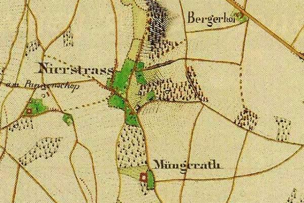 Preußische Kartenaufnahme 1846 - Uraufnahme - (5002 Geilenkirchen)